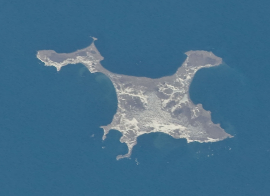 Остров Танфильева. Снимок с МКС. Фрагмент